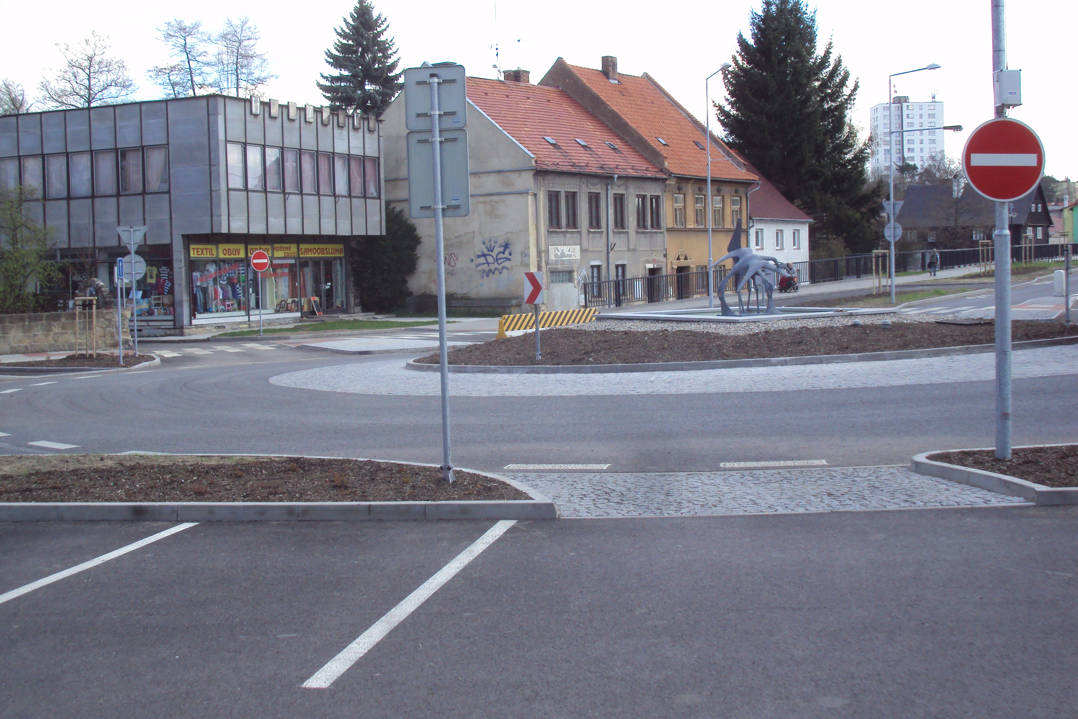 Na nám. Čsl. armády v Mimoni vytvořen nový kulaťák